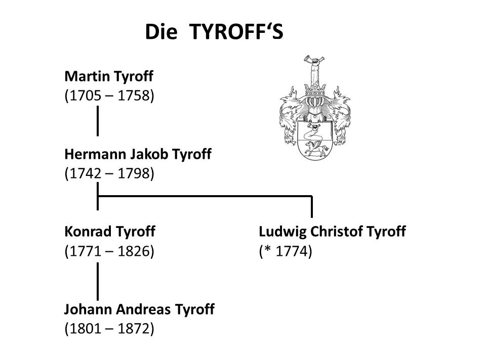 Stammbaum der männlichen Tyroffs mit Familienwappen